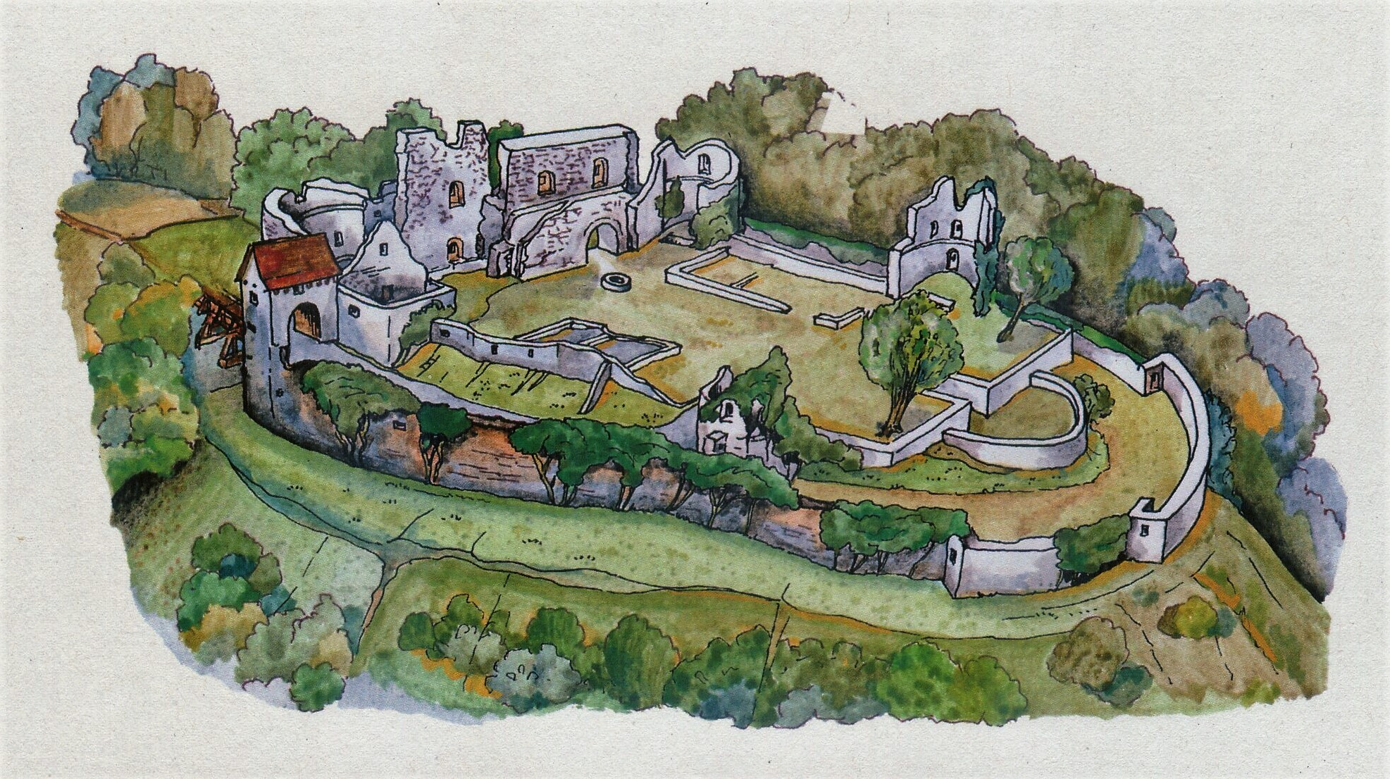 Küssaburg im Landkreis Waldshut in Baden-Württemberg. Darstellung der Ruine. Zeichnung von Wolf Pabst.